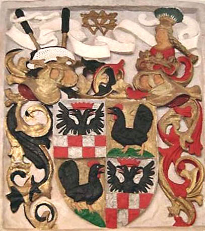 Wappen von Henneberg-Schleusingen in Kloster Veßra, eigene Fotografie von Willhelm01